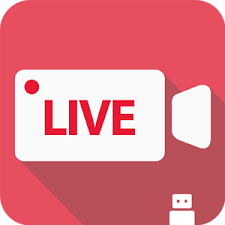 البث في تطبيقات أخرى